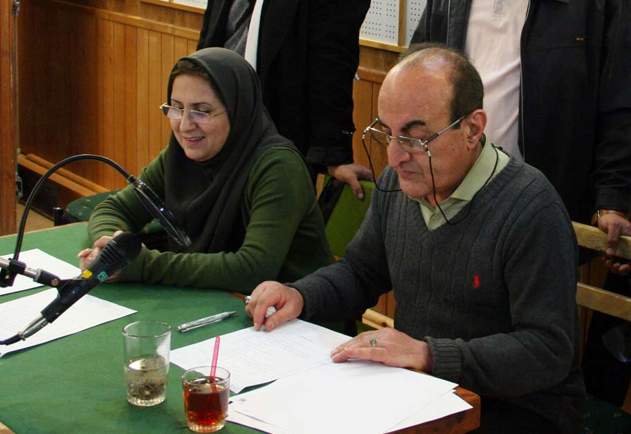 ناهید امیریان شمس‌آبادی و تورج نصر درحال اجرای نمایشهای برنامه کوی نشاط